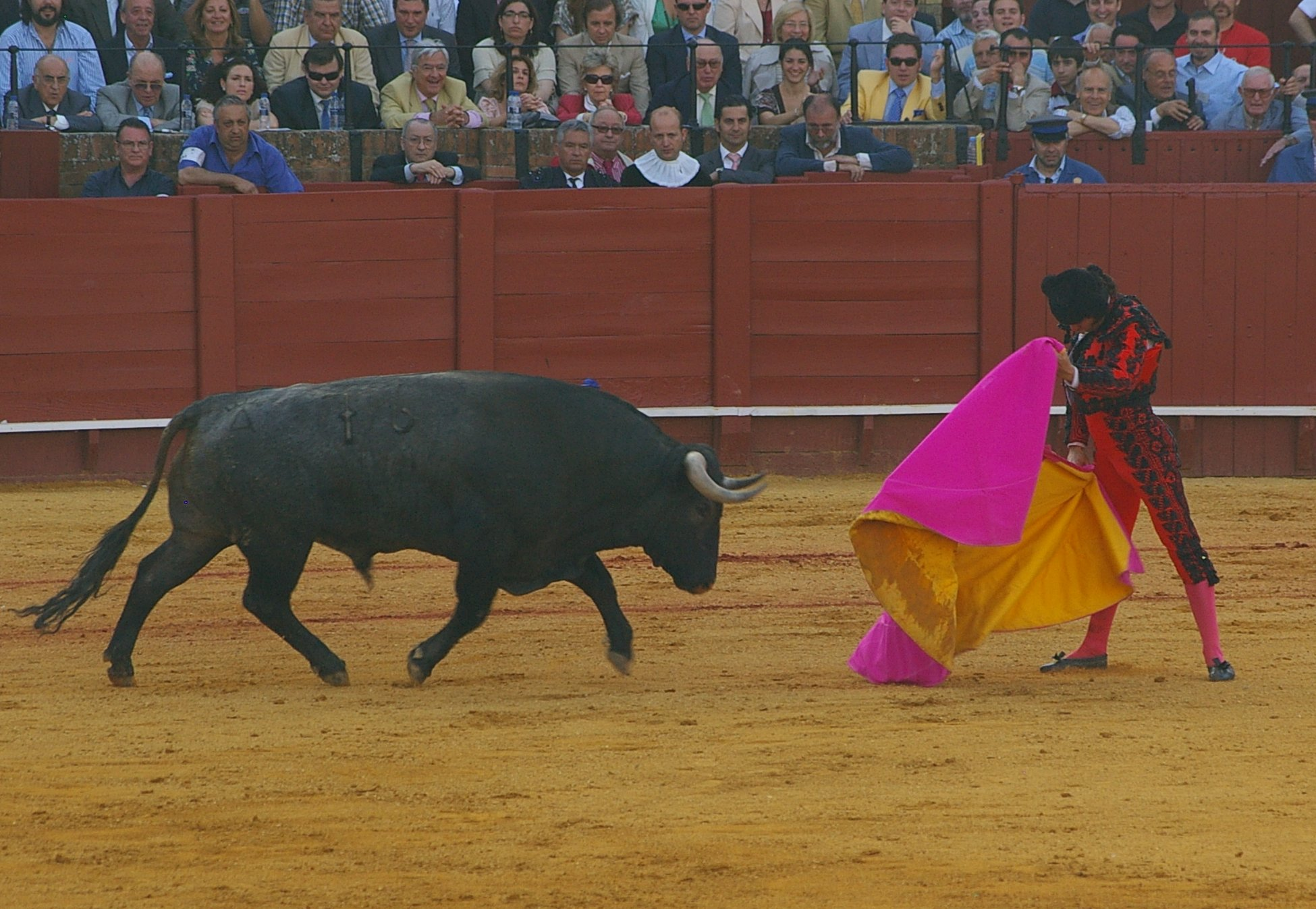 Morante de la Puebla en La Maestranza de Sevilla, ante un toro de Victorino Martín.